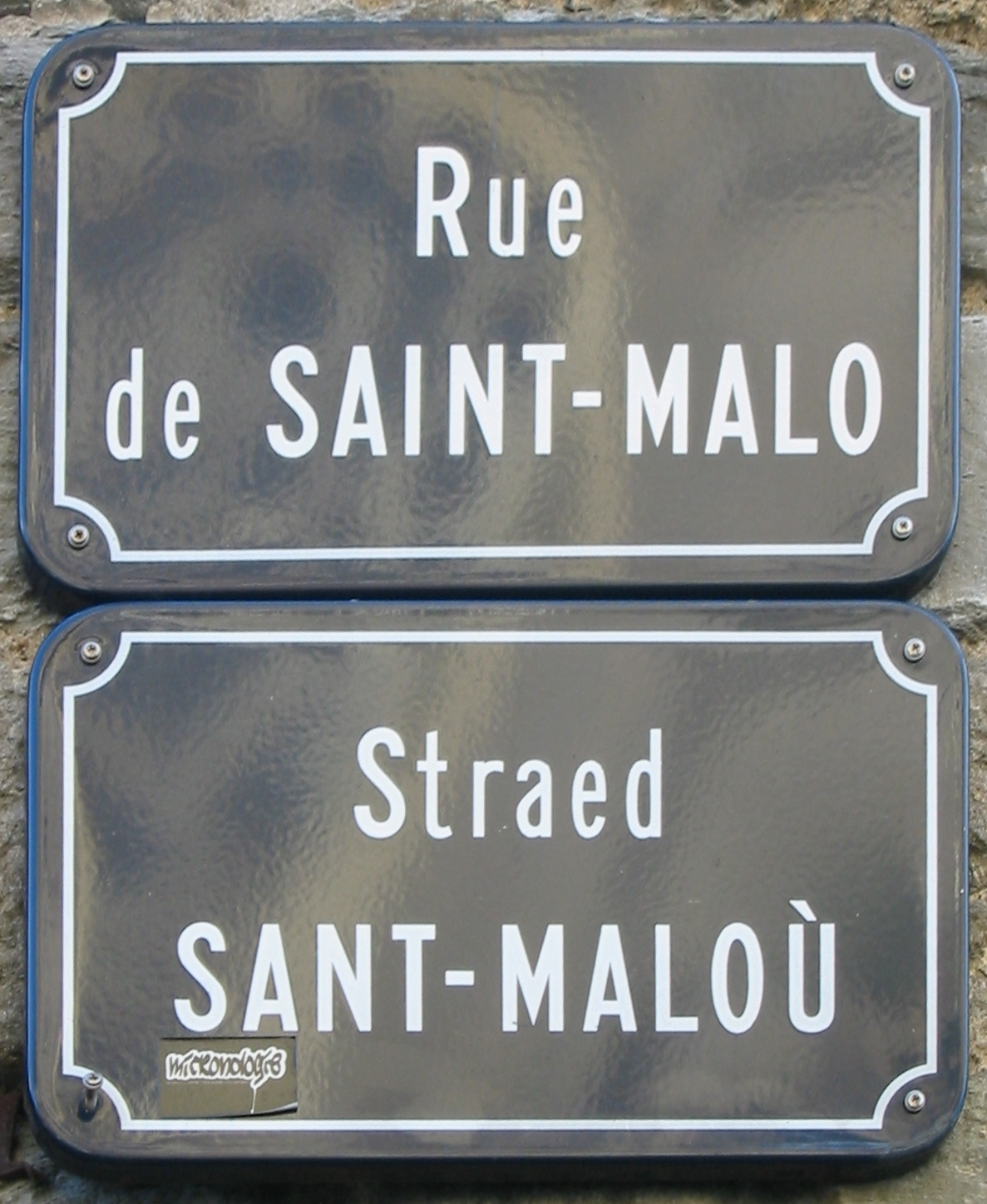 Rennes Nrf: Rennes